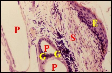 Réaction à cellules géantes provoquée par une prothèse fragmentée dans la paroi d'un cholestéatome